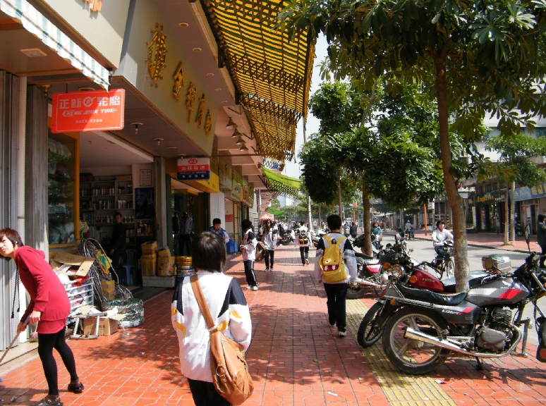 达濠红桥路